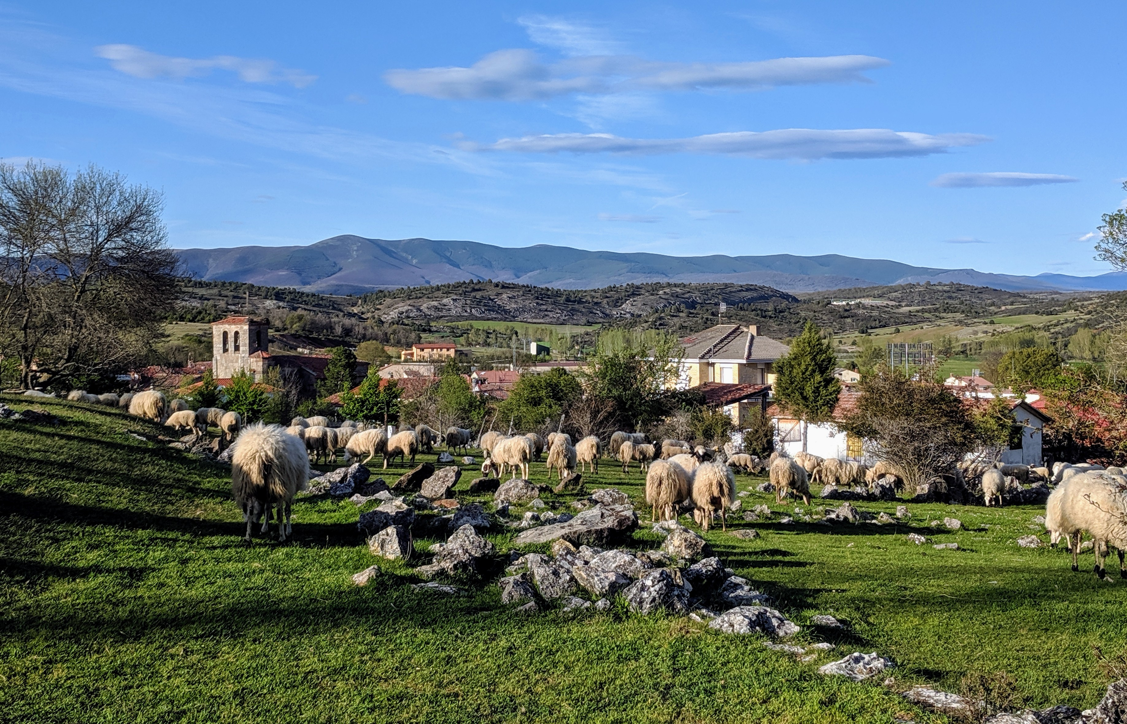 Vista general de Hortigüela, Burgos, España.